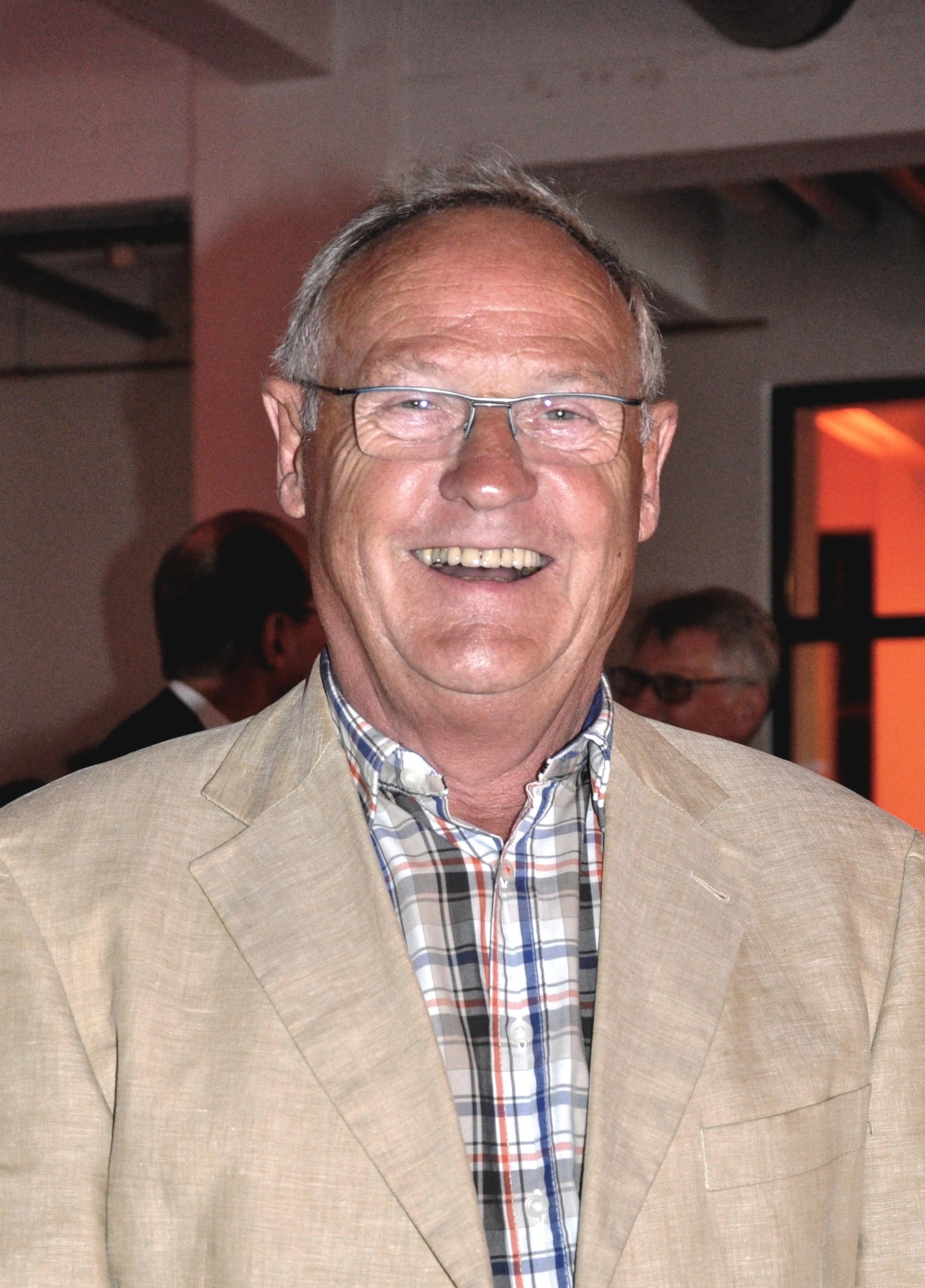 Rolf Roggendorf, deutscher Radrennfahrer